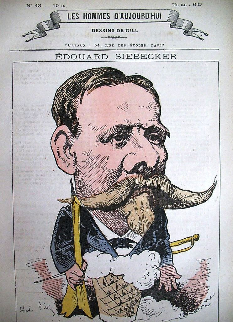 Caricature d’Édouard Siebecker dans Les Hommes d'aujourd'hui, n° 43.